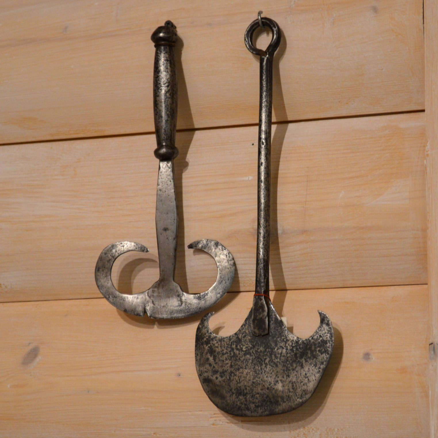 Сечки. Конец 19 - начало 20 в.